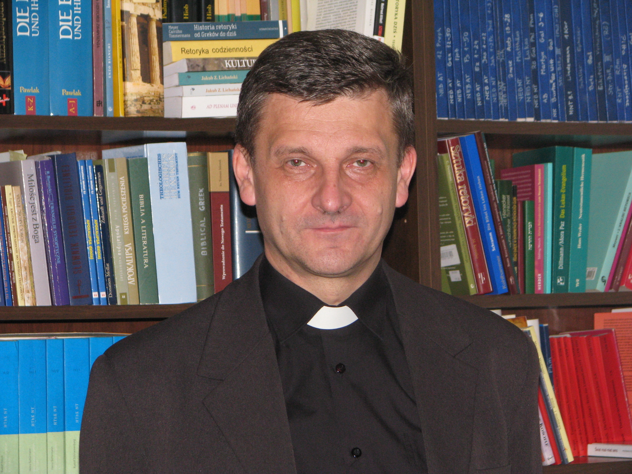 ks. prof. dr hab. Roman Pindel